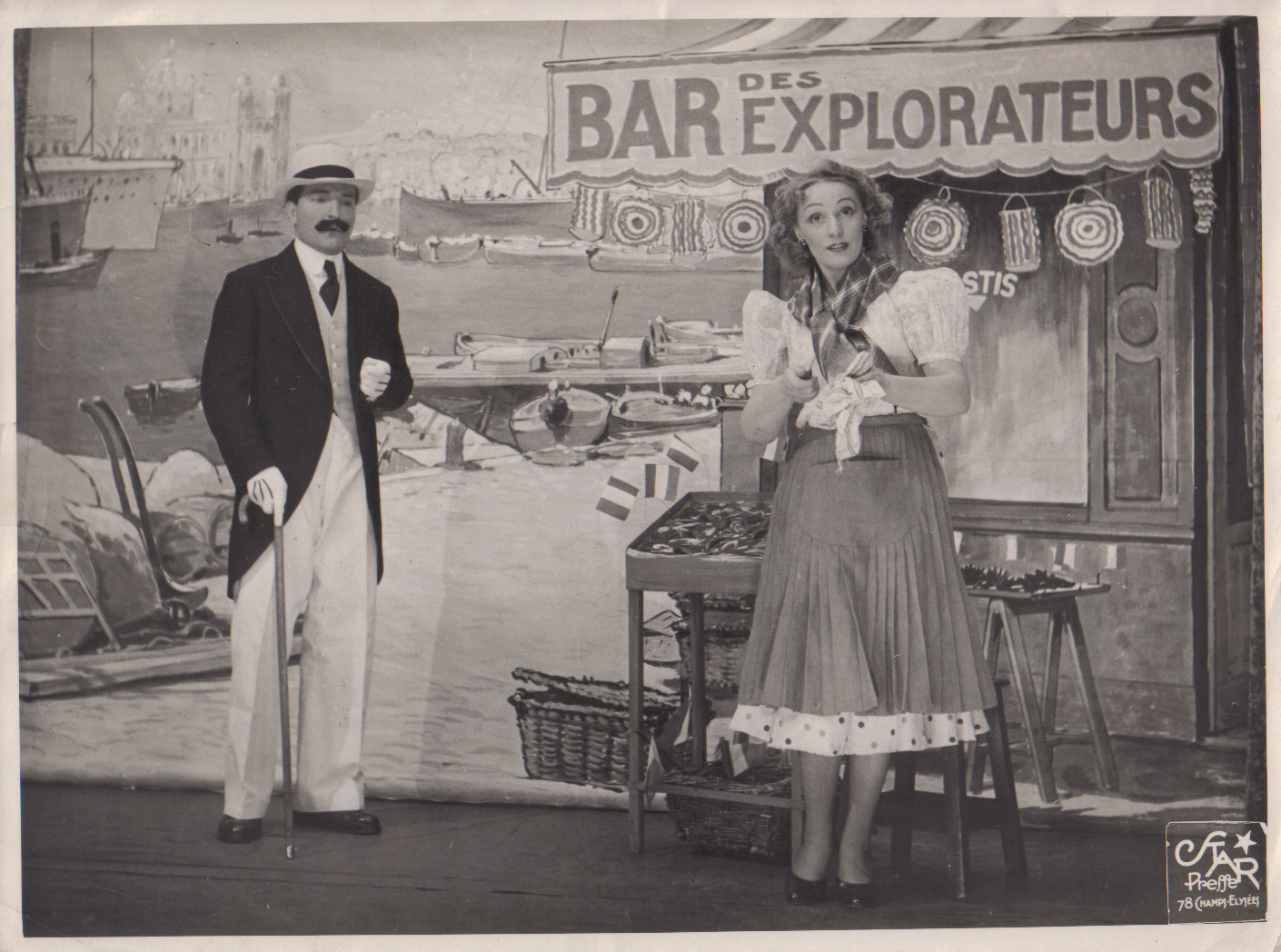 Cloé Vidiane jouant la comédie.